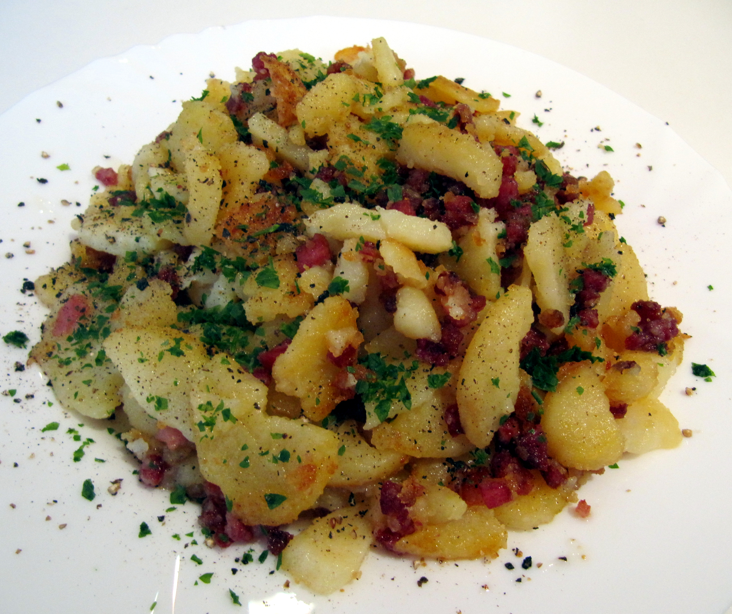 GT_Bratkartoffeln_1